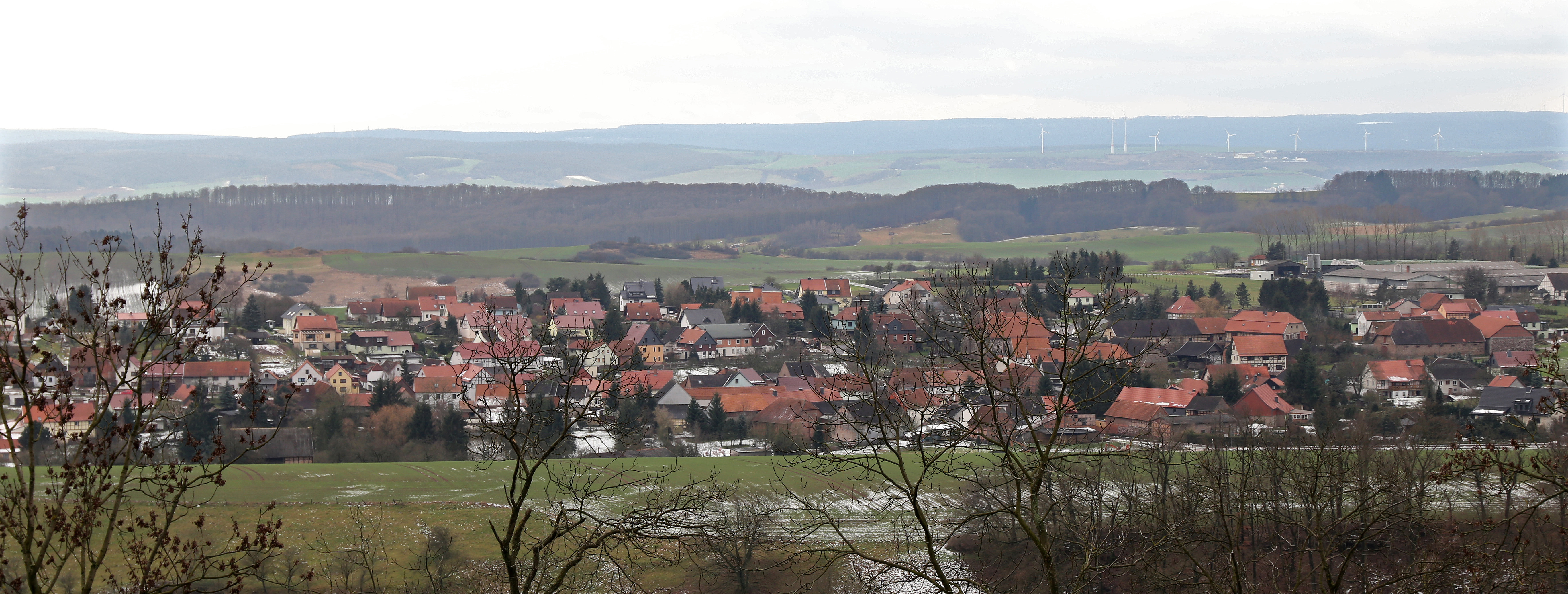 Blick von der Ebersburg auf Herrmannsacker im Januar 2016 (ganz im Hintergrund ist die Hainleite erkennbar)